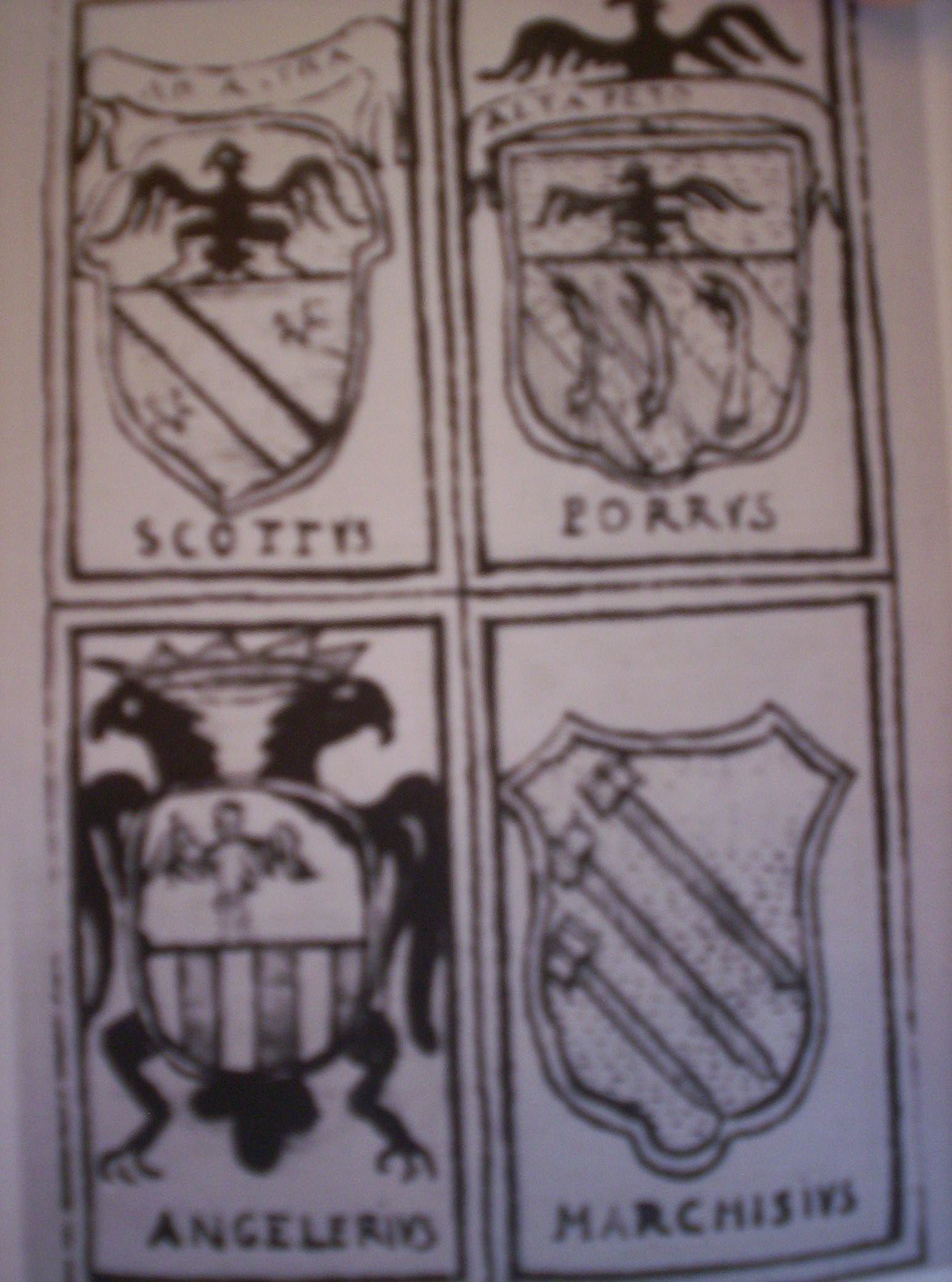 Blaxonarium casalense. Frontespizio , Immagine tratta dallo "Studium" ACCADEMIA di Casale e del Monferrato 1985.